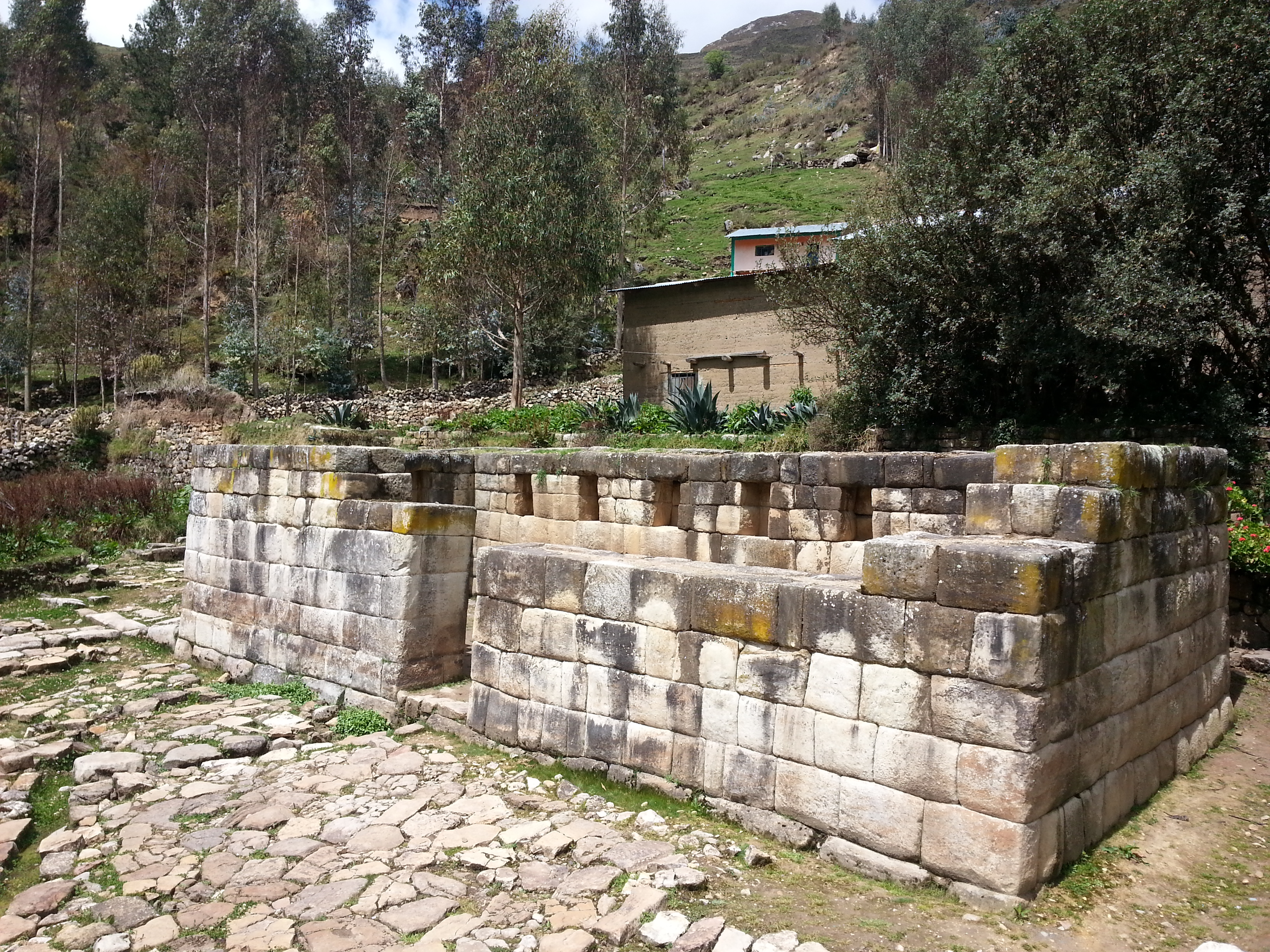 Tambo de la época incaica, parte del complejo arqueológico Inca de Huarautambo, Yanahuanca, Pasco